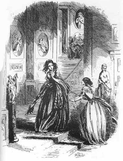 Dombey and Son, Florence et Edith sur le grand escalier de la maison alors qu'Edith s'apprête à fuir (chapitre 47)